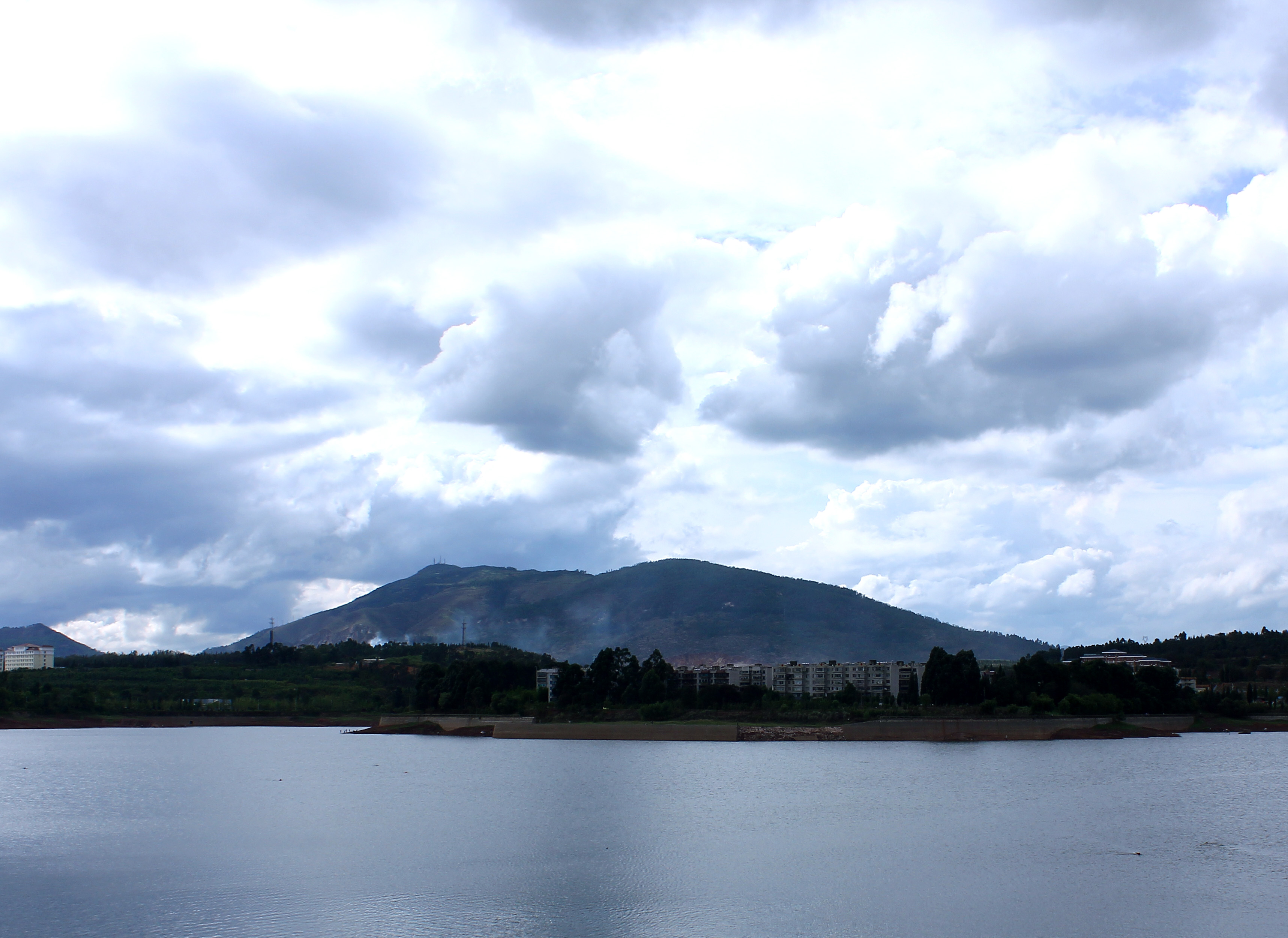 云南省安宁市龙山，近处水面为张家坝水库。